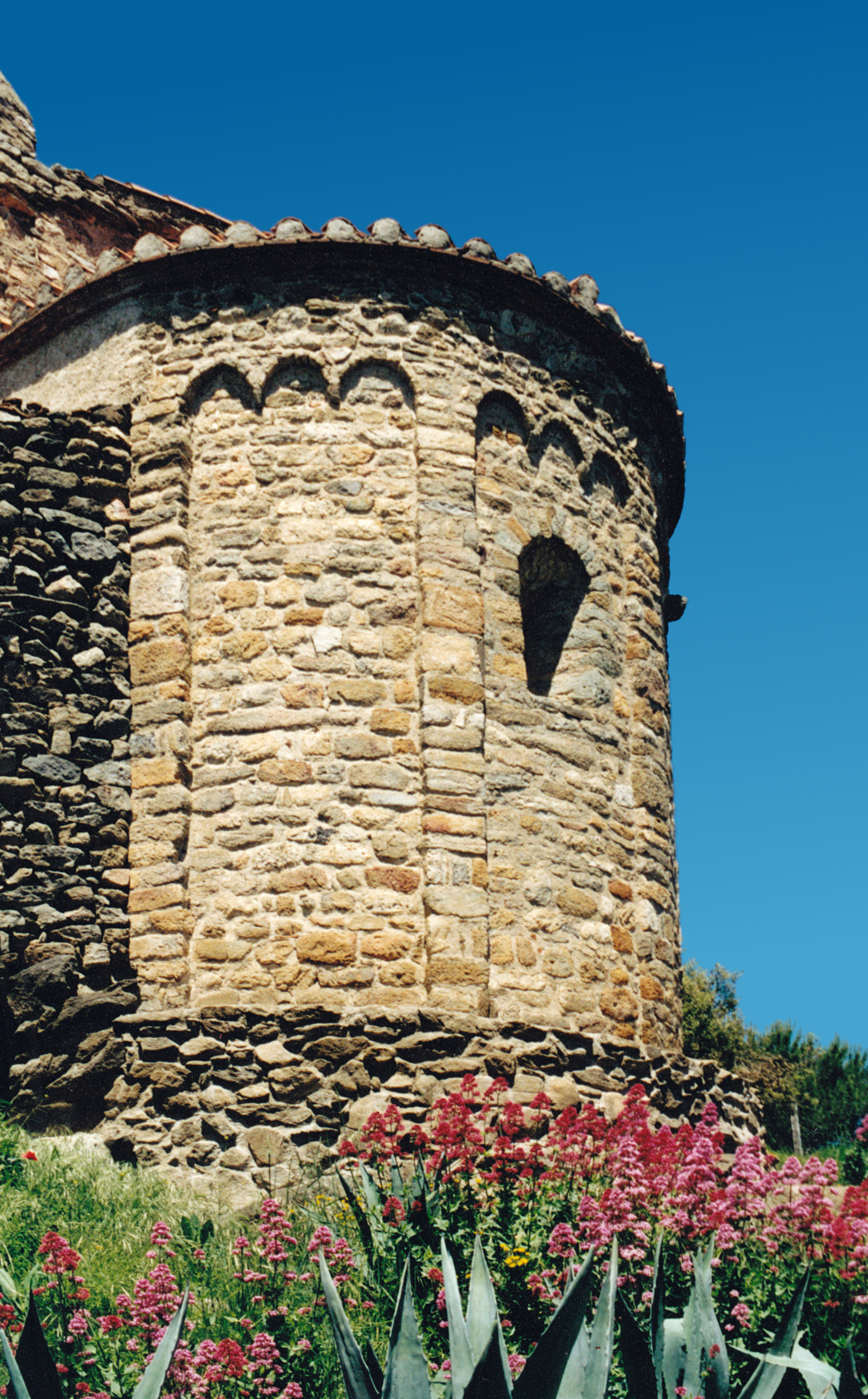 France - Pyrénées-Orientales - Conflent - Arboussols - Église Notre-Dame des Escaliers de Marcevol